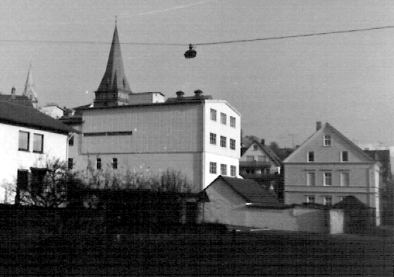 Brauns-Heitmann, Klockenstraße 8-10, Warburg 1979